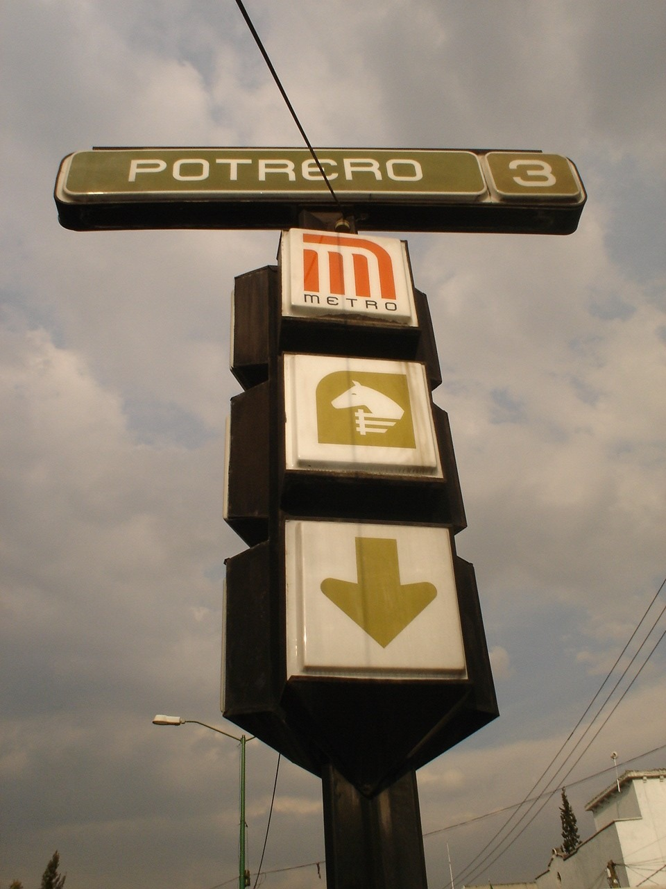 ESTACION POTRERO DEL METRO Date taken: 21 12 2006